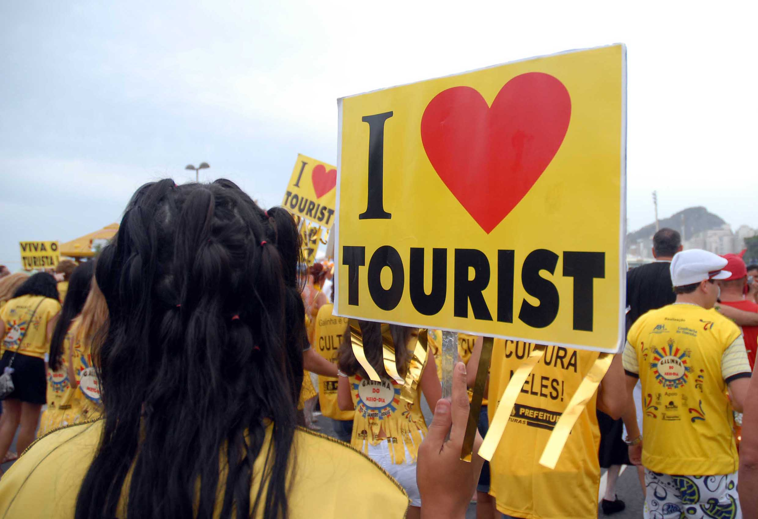 Fisioterapeuta massageia cliente.